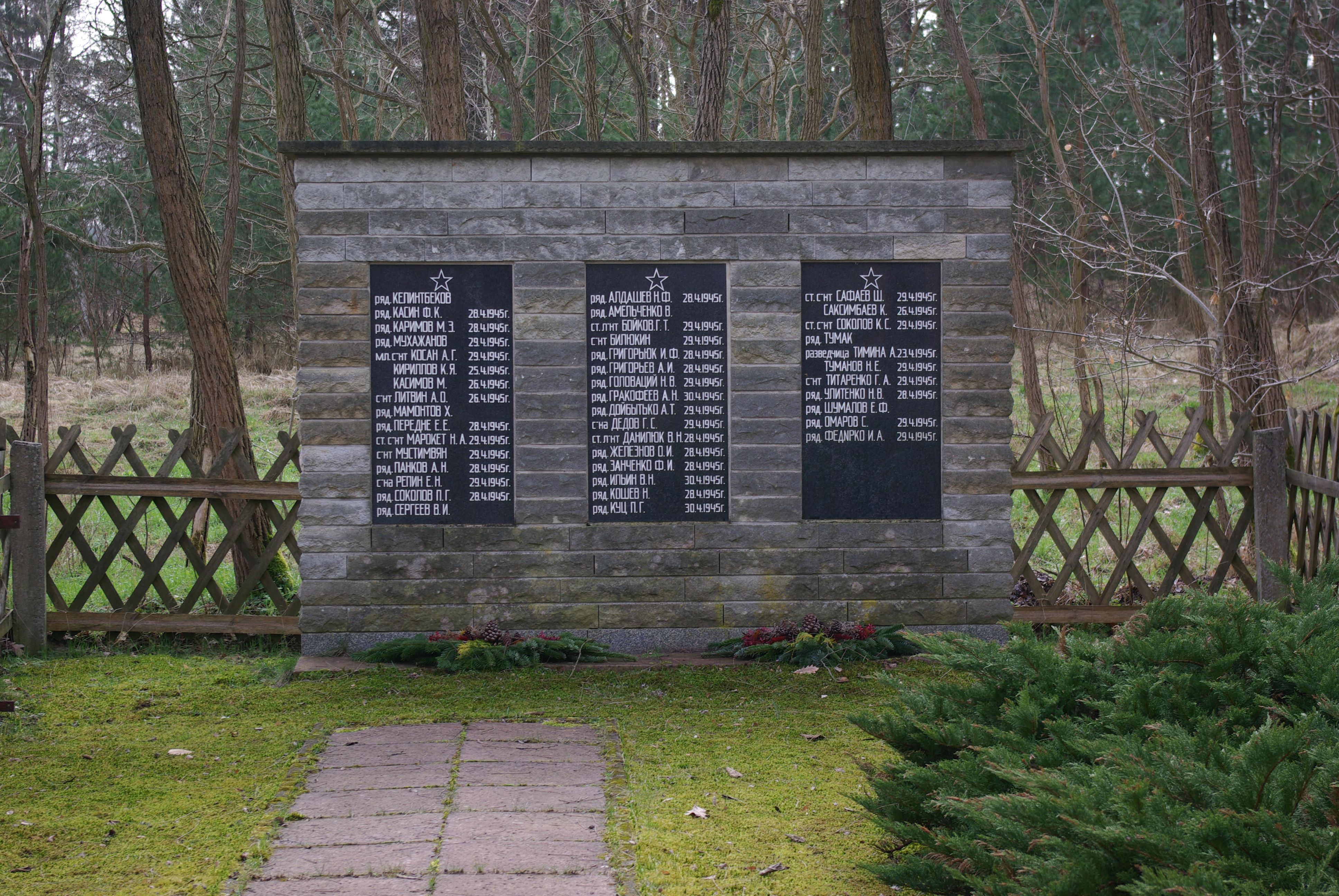 Halbe, Ortsteil Freidorf. Der Sowjetische Friedhof, der an gefallene Soldaten 1945 erinnert. Der Friedhof steht unter Denkmalschutz.